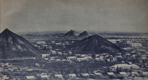 Типовий донбаський пейзаж